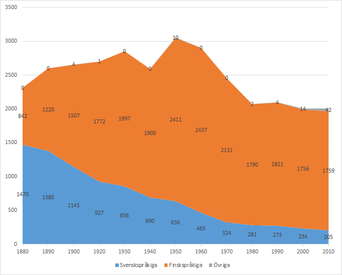 Språklig-demografisk utveckling i Mörskom kommun. Under perioden 1880-2010 ändrade området karaktär från att ha varit övervägande svenskspråkigt till finskt. Under hela perioden har de svenskspråkiga minskat i såväl absoluta tal som proportionellt. Data hämtade från svenskspråkiga Wikipedia. } ÅrAntal (Andel av befolkningen, %)FinskspråkigaSvenskspråkigaÖvrigaTotalt1880842 (36,4)1470 (63,6)0 (0,0)231218901220 (46,9)1380 (53,1)0 (0,0)260019001507 (56,7)1145 (43,1)4 (0,2)265619201772 (65,6)927 (34,3)1 (0,0)270019301997 (70,0)856 (30,0)0 (0,0)285319401900 (73,4)690 (26,6)0 (0,0)259019502411 (78,9)636 (20,8)10 (0,3)305719602437 (84,0)465 (16,0)0 (0,0)290219702131 (86,8)324 (13,2)0 (0,0)245519801790 (86,3)281 (13,6)2 (0,1)207319901821 (86,8)273 (13,0)4 (0,2)209820001756 (87,6)234 (11,7)14 (0,7)200420101759 (87,7)205 (10,2)42 (2,1)2006Date5 October 2016SourceOwn workAuthorAaker Licensing[edit]